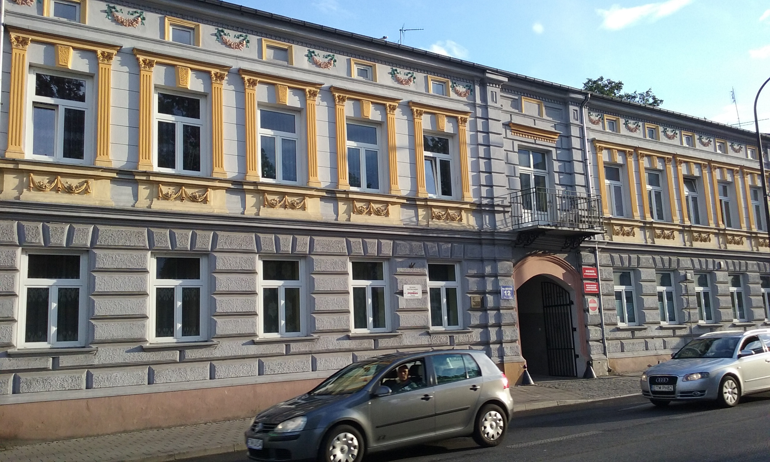 Tomaszów Mazowiecki w wojewódzwie łódzkim, PL, EU. Lokalne biuro NSZZ Solidarność przy ul. Mościckiego 12